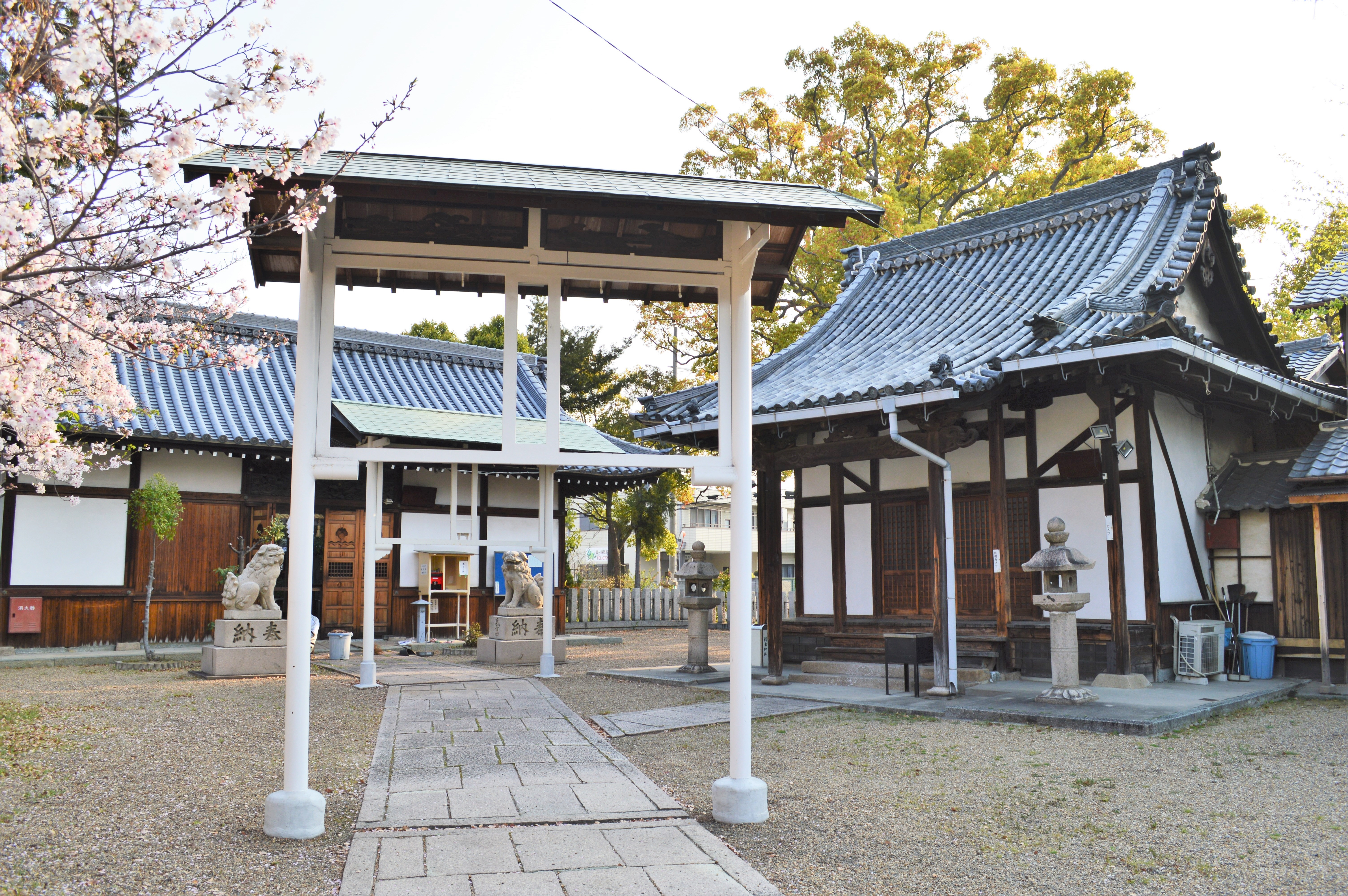 樟本神社 (八尾市南木の本) 境内